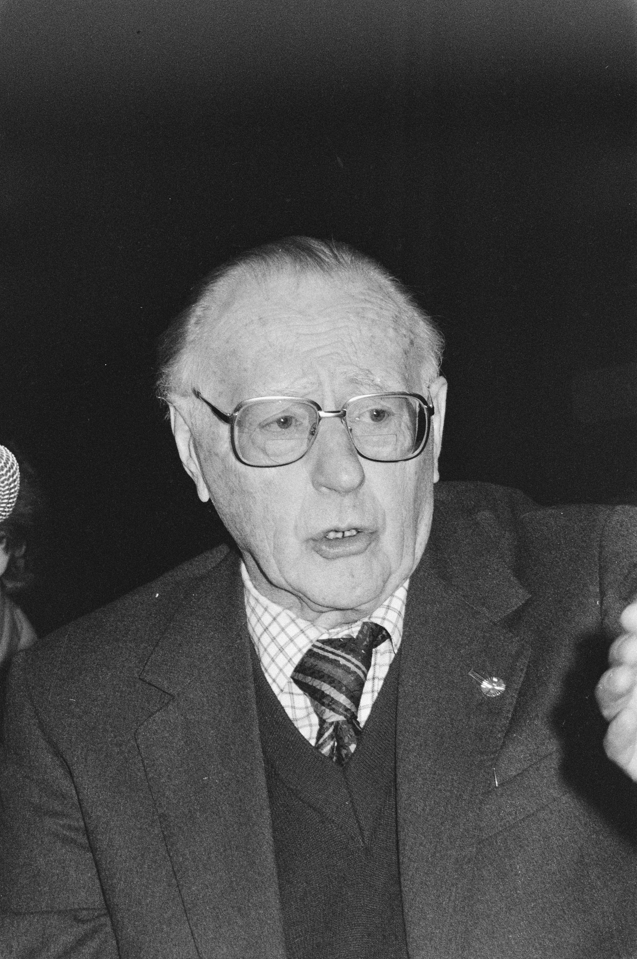 Collectie / Archief : Fotocollectie Anefo Reportage / Serie : [ onbekend ] Beschrijving : Theun de Vries krijgt de Henriette Roland Holst Prijs 1984 voor zijn boek "Ketters, veertien eeuwen ketterij " Theun de Vries (kop) Datum : 19 januari 1985 Trefwoorden : boeken, schrijvers Persoonsnaam : Vries, Theun de Fotograaf : Vollebregt, Sjakkelien / Anefo Auteursrechthebbende : Nationaal Archief Materiaalsoort : Negatief (zwart/wit) Nummer archiefinventaris : bekijk toegang 2.24.01.05 Bestanddeelnummer : 933-2073